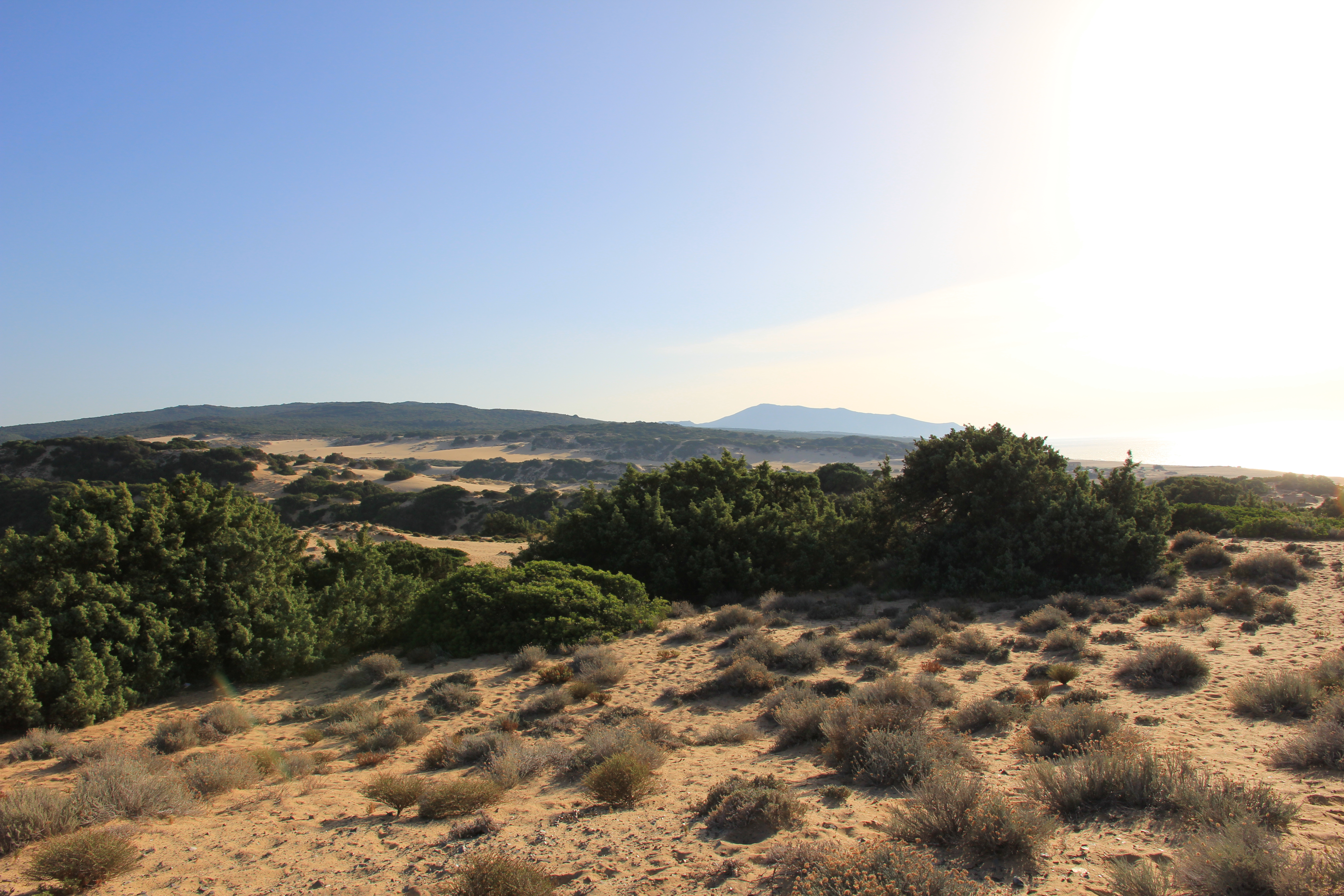 Arbus - Dune di Piscinas